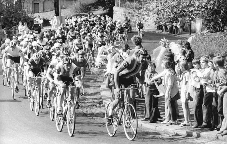 Friedensfahrt, Fahrerfeld ADN-ZB Reiche 26.4.78 CSSR: Vorbereitungsmotiv zur 31.Internationalen Friedensfahrt Berlin-Prag-Warschau vom 10.bis 24.Mai 1978. Nur noch wenige Tage und die Giganten der Landstraße werden in den drei Veranstaltungsländern DDR, CSSR und VR Polen von den begeisterten Zuschauern herzlich gefeiert werden. Auf der 10.Etappe des Vojahres führt hier Vlatimil Moravec (CSSR) das Haptfeld 200 m vor der Bergwertung in Kamenicki Senov (CSSR) an.